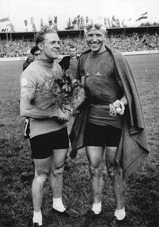 Jan Vesely, G.-A."Täve" Schur Zentralbild Kronfeld 17.5.1955 VIII. Internationale Radfernfahrt für den Frieden Prag-Berlin-Warschau 1955. UBz: Zwei grosse Rivalen während des Kampfes - zwei gute Freunde: Jan Vesely (CSR) und Gustav-Adolf Schur (DDR).